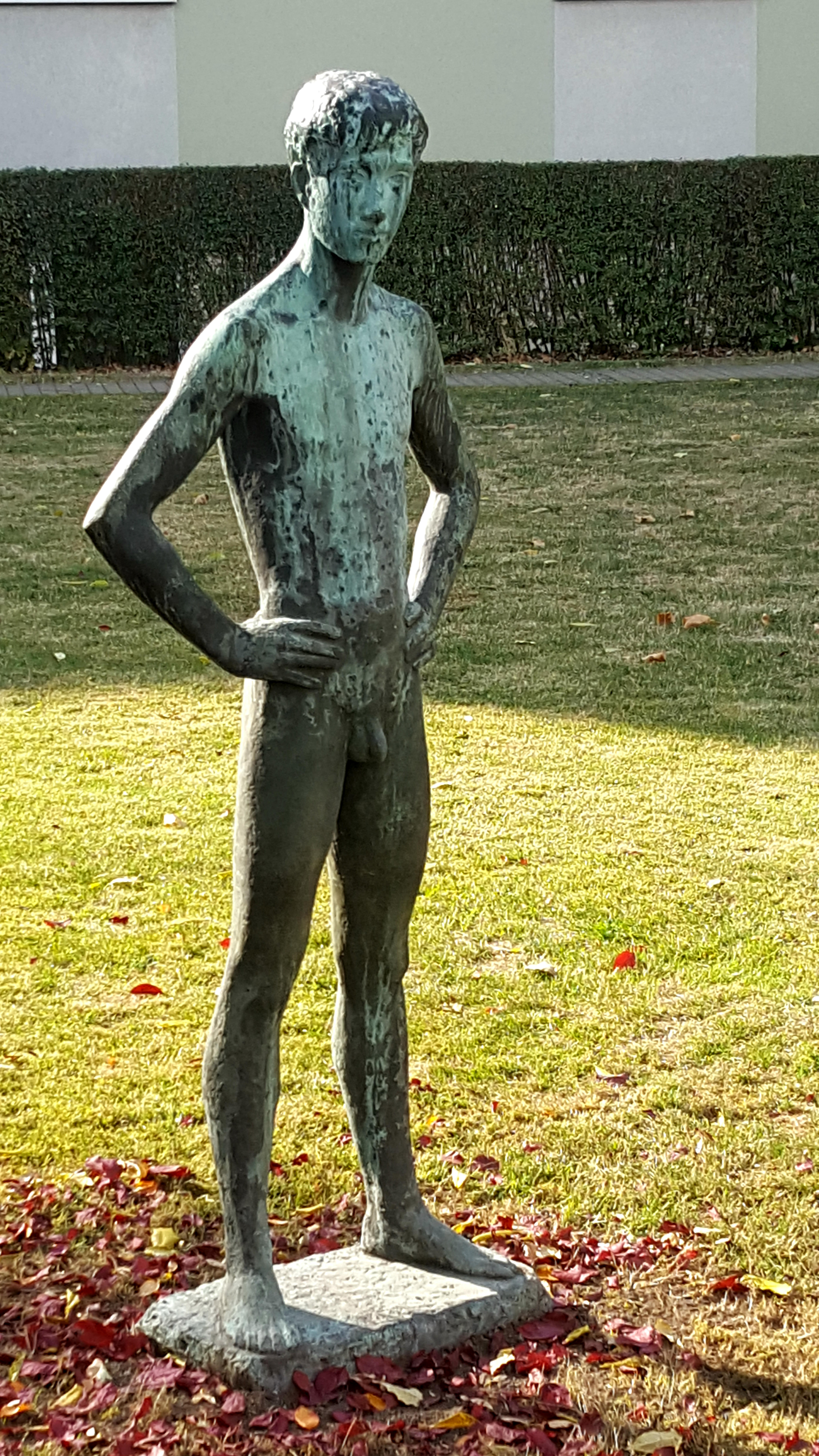 Stehender Jüngling von Dresdner Bildhauer Wilhelm Landgraf. 1967 Stehender Jüngling - 1996 gestohlen - 2015 zurückgekehrt. Wiederaufstellung anläßlich seines 20. Todestages am Klinikum Dresden Neustadt, Industriestraße